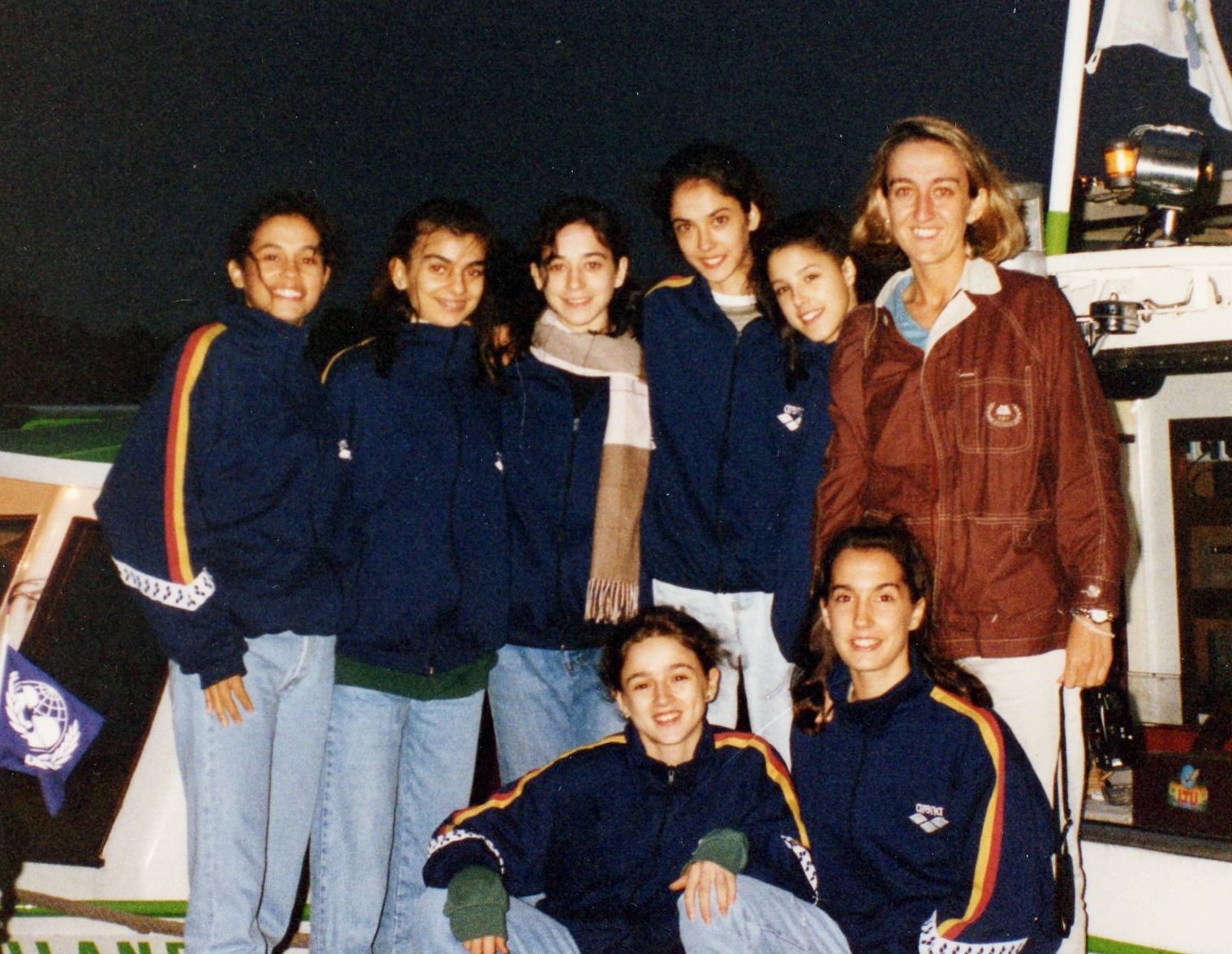 El conjunto español de gimnasia rítmica durante una visita a París en 1995, con motivo de la disputa del torneo de Corbeil-Essonnes.